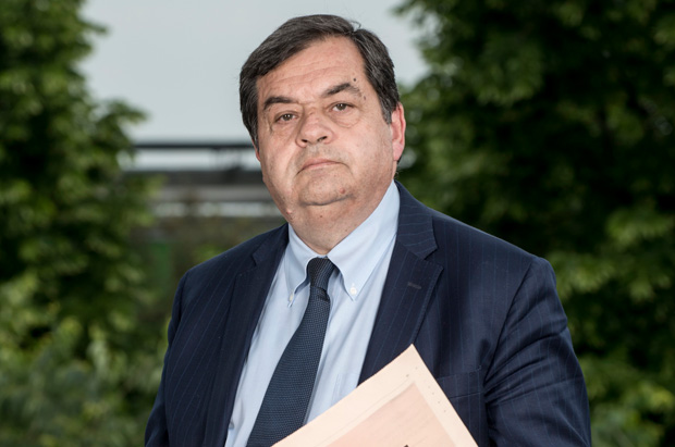 Guido Gentili